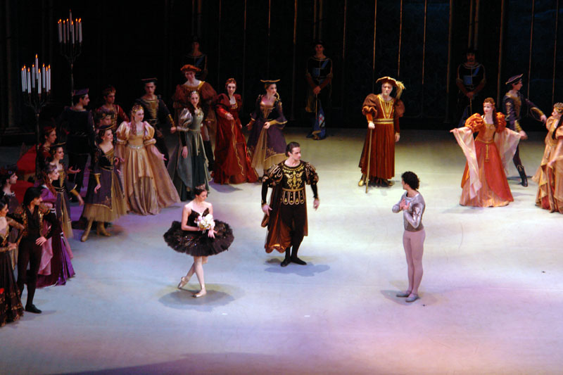 Nino Ananiashvili in Swan Lake ballet